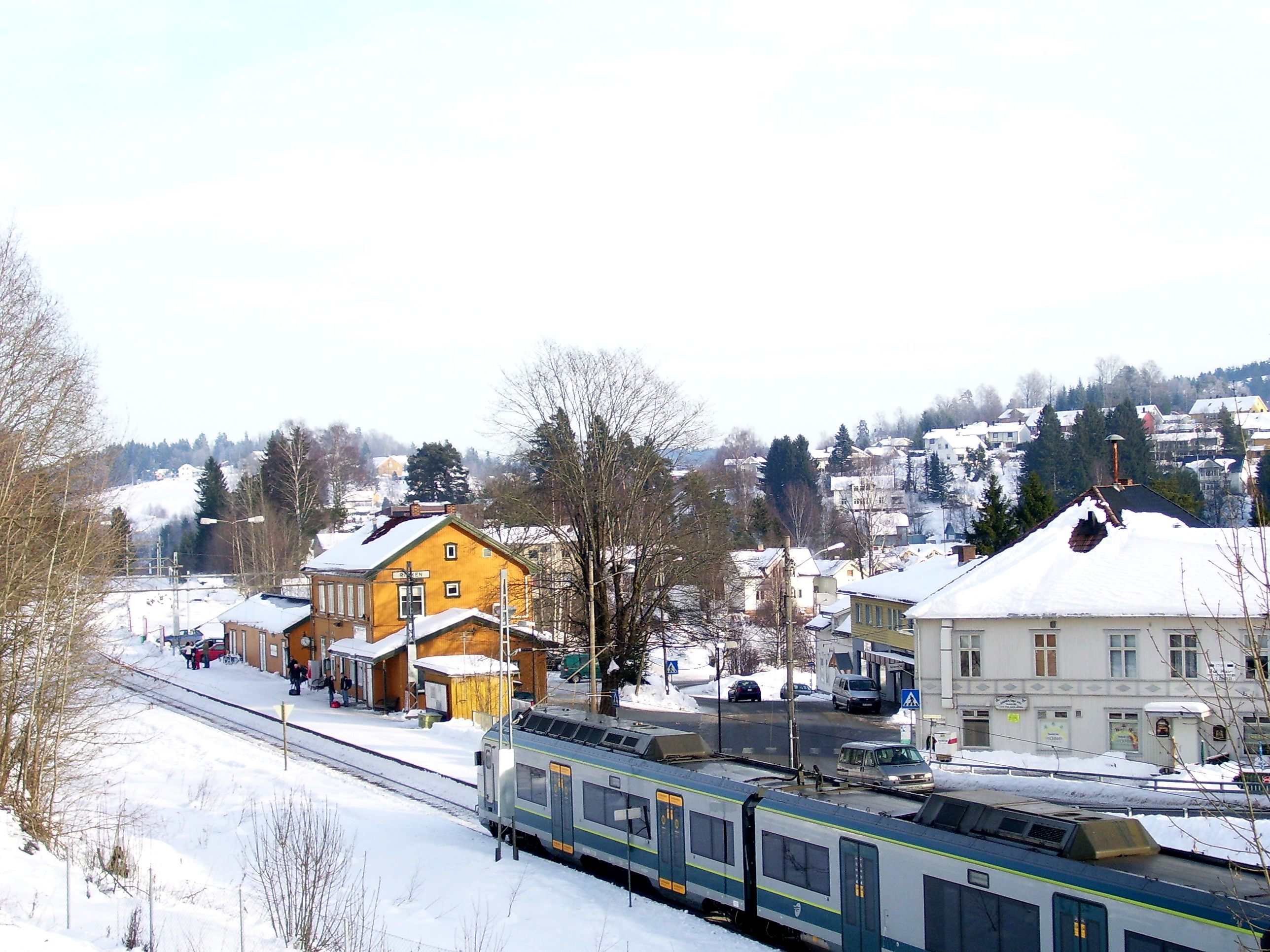 Røyken stasjon. Januar 2006